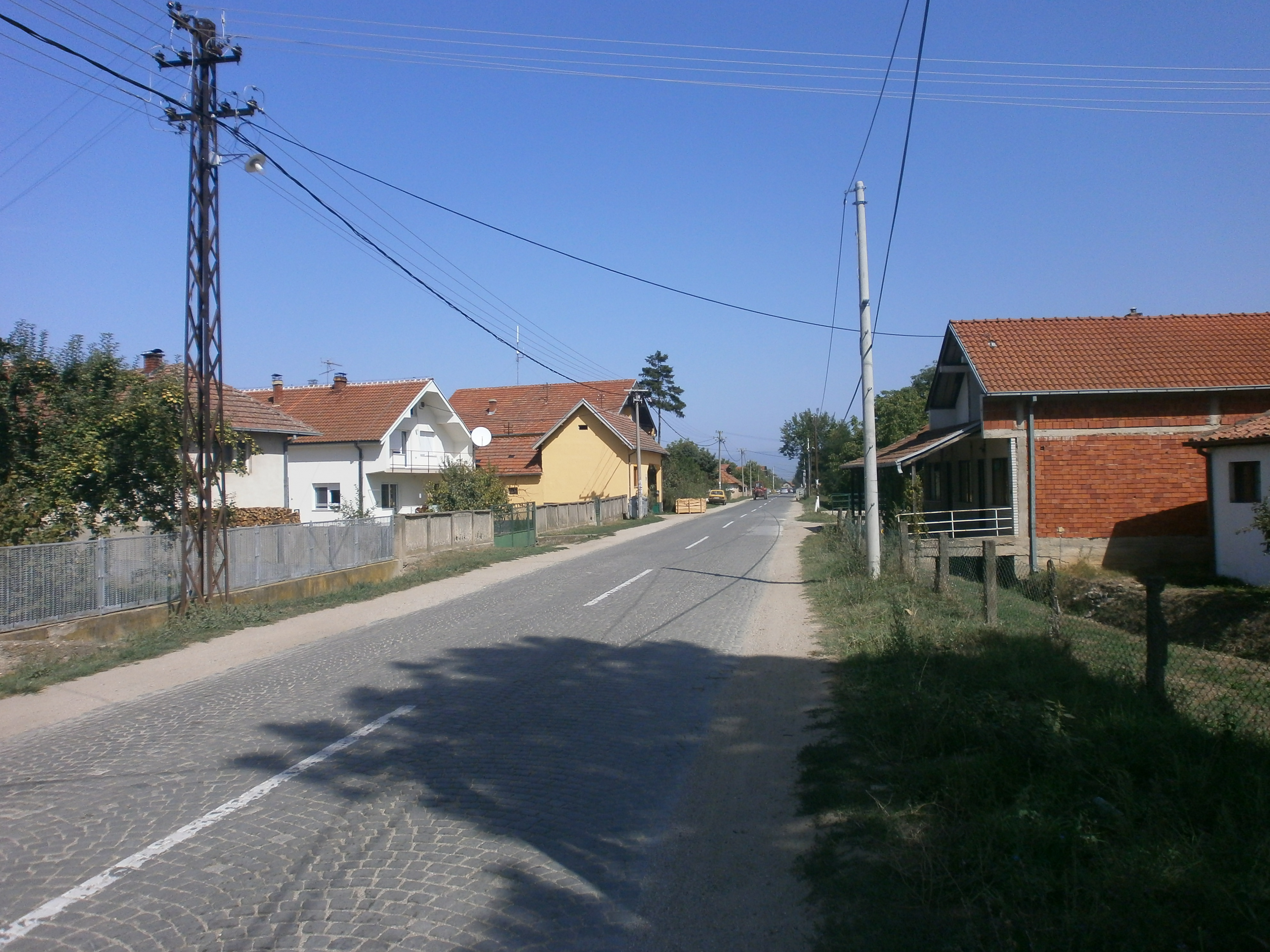 Srpski (latinica): Strojkovce, Leskovac